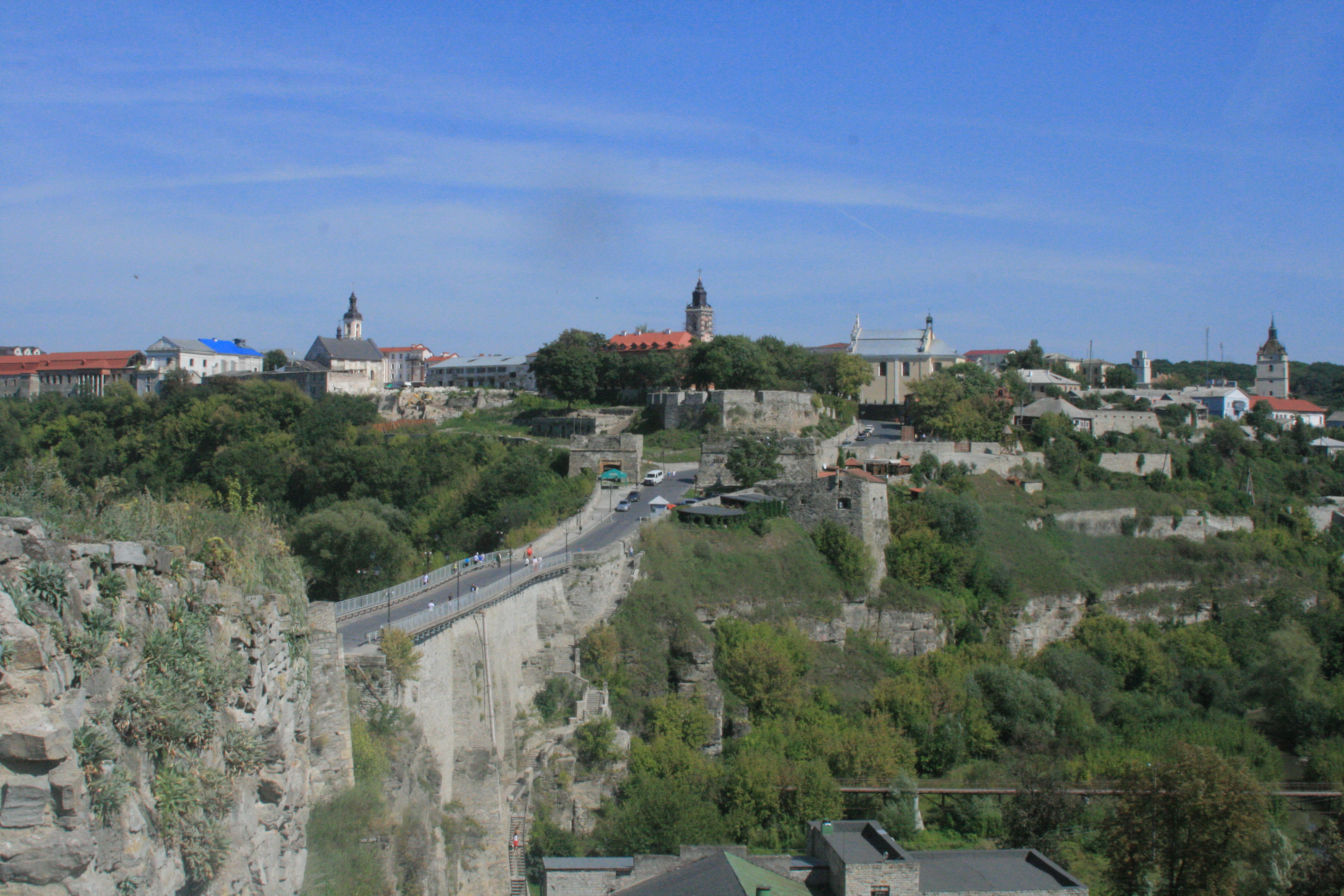 Stare Misto, Kam'yanets'-Podil's'kyi, Khmel'nyts'ka oblast, Ukraine